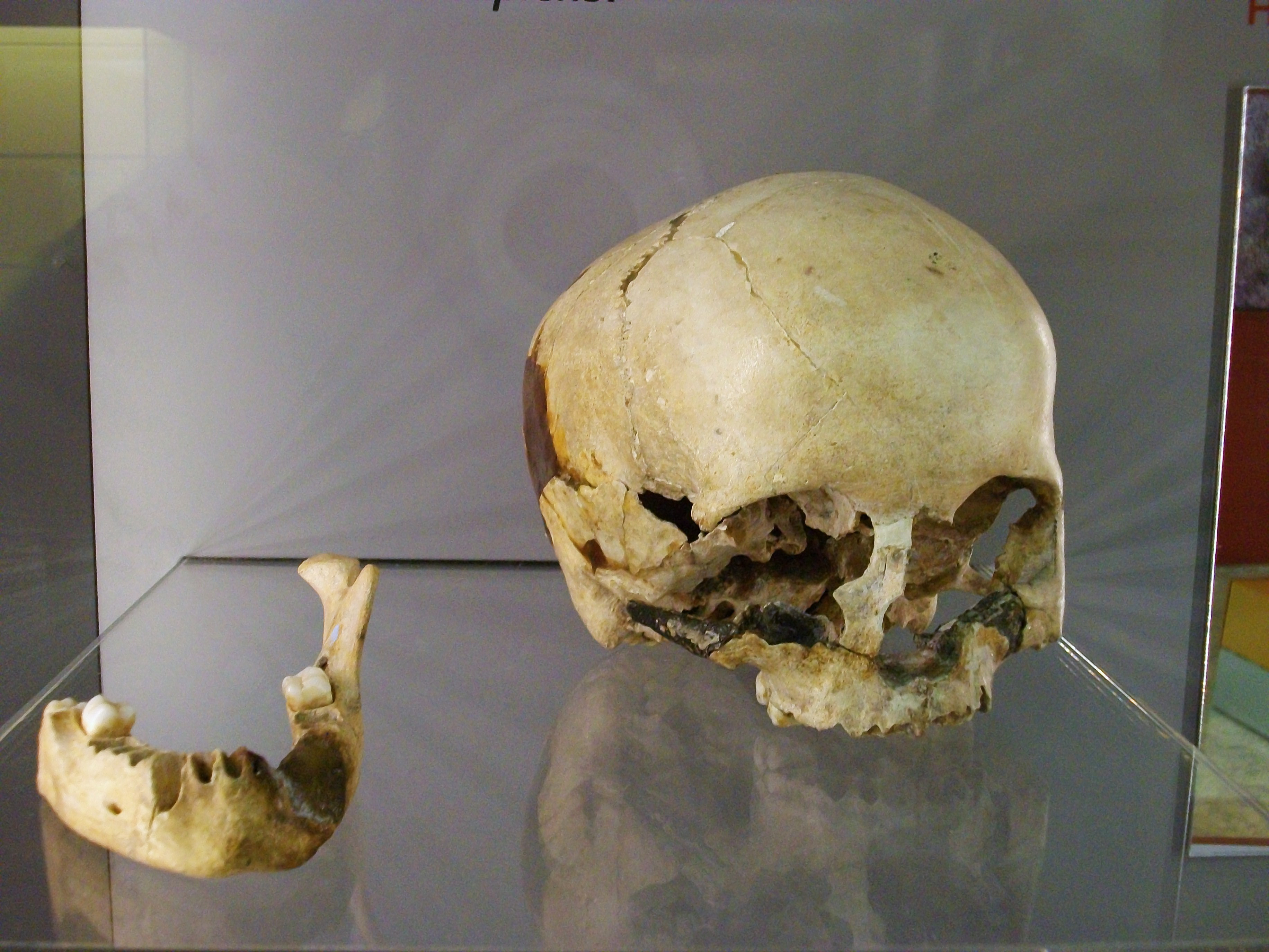 Restes d'Homo Sapiens (Paleolític Superior), crani i mandíbula ullal superior dret, tercer molar inferior dret, tibia dreta i fragment de parietal esquerre. Procedent de la Cova del Parpalló (Gandia, la Safor).